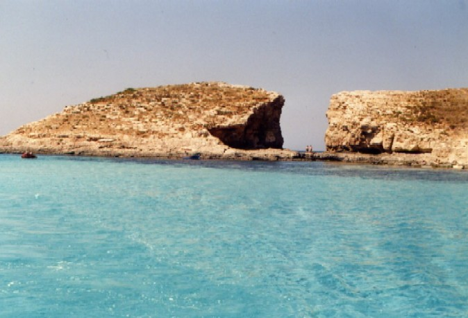 Blue lagoon between Comino and Cominotto (Malta) Blaue Lagune zwischen den Inseln Comino und Cominotto (Malta) Modrá zátoka mezi ostrůvky Comino a Cominotto (Malta)